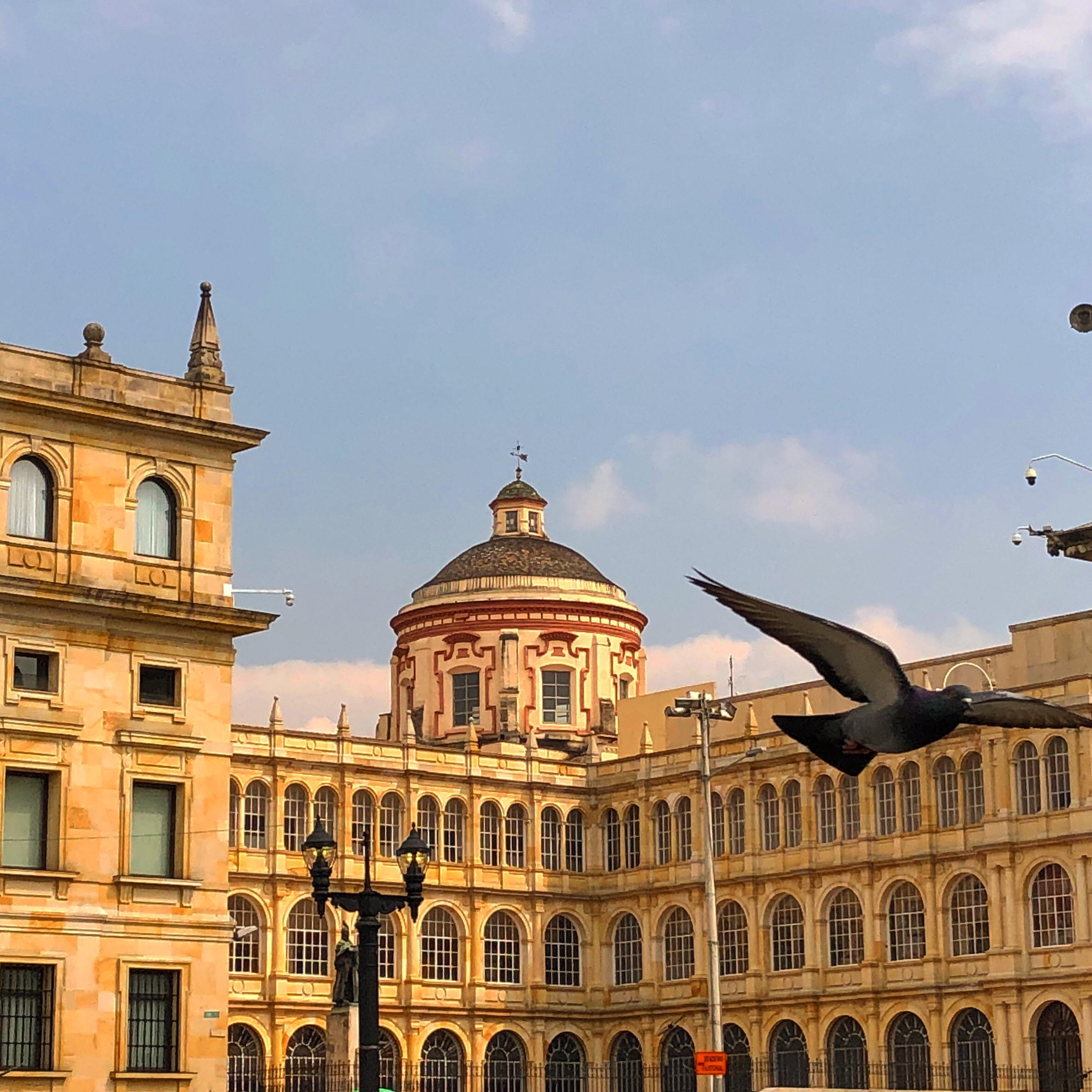 Colegio Mayor de San Bartolomé, Plaza de Bolívar. Por: @f.o.g.photography